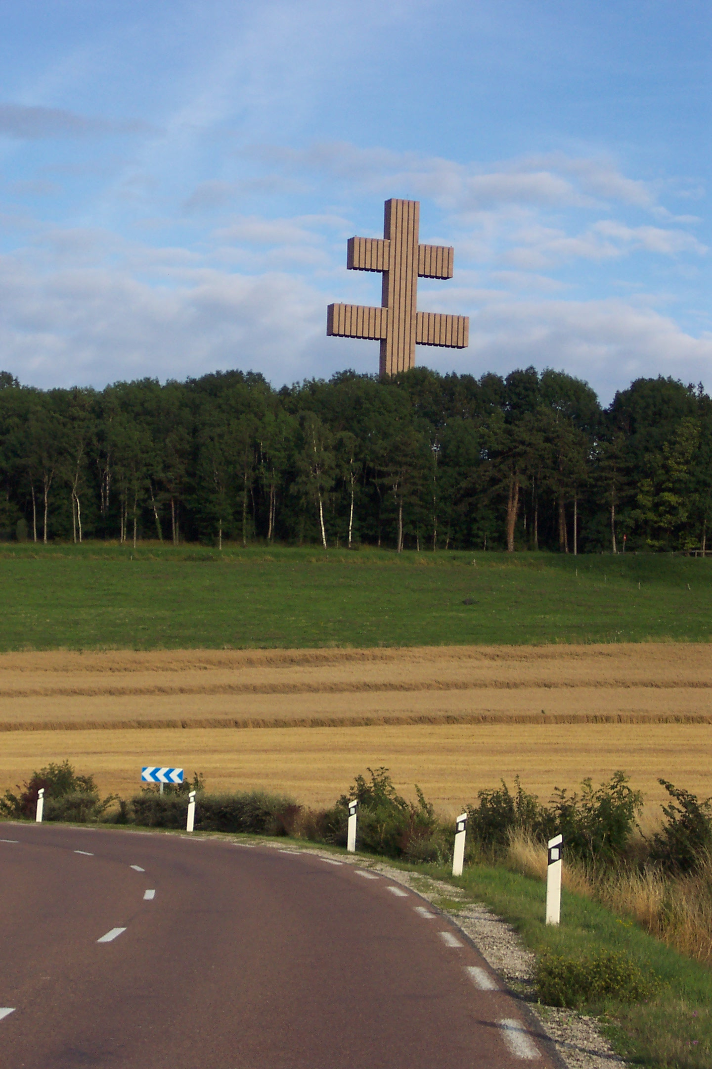 Deze foto werd op 27/07/2005 genomen door mijzelf. Ik stel de foto dan ook vrij van alle mogelijke soorten licenties. Hij mag door iedereen gebruikt worden.